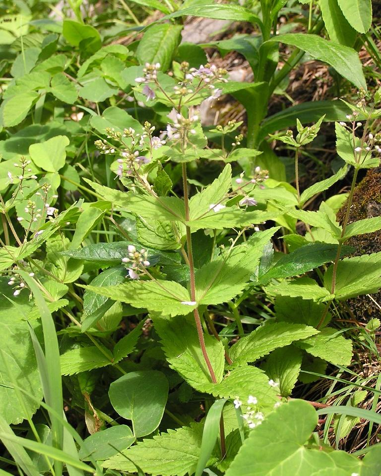 Veronica urticifolia bei Obertraun in Österreich.